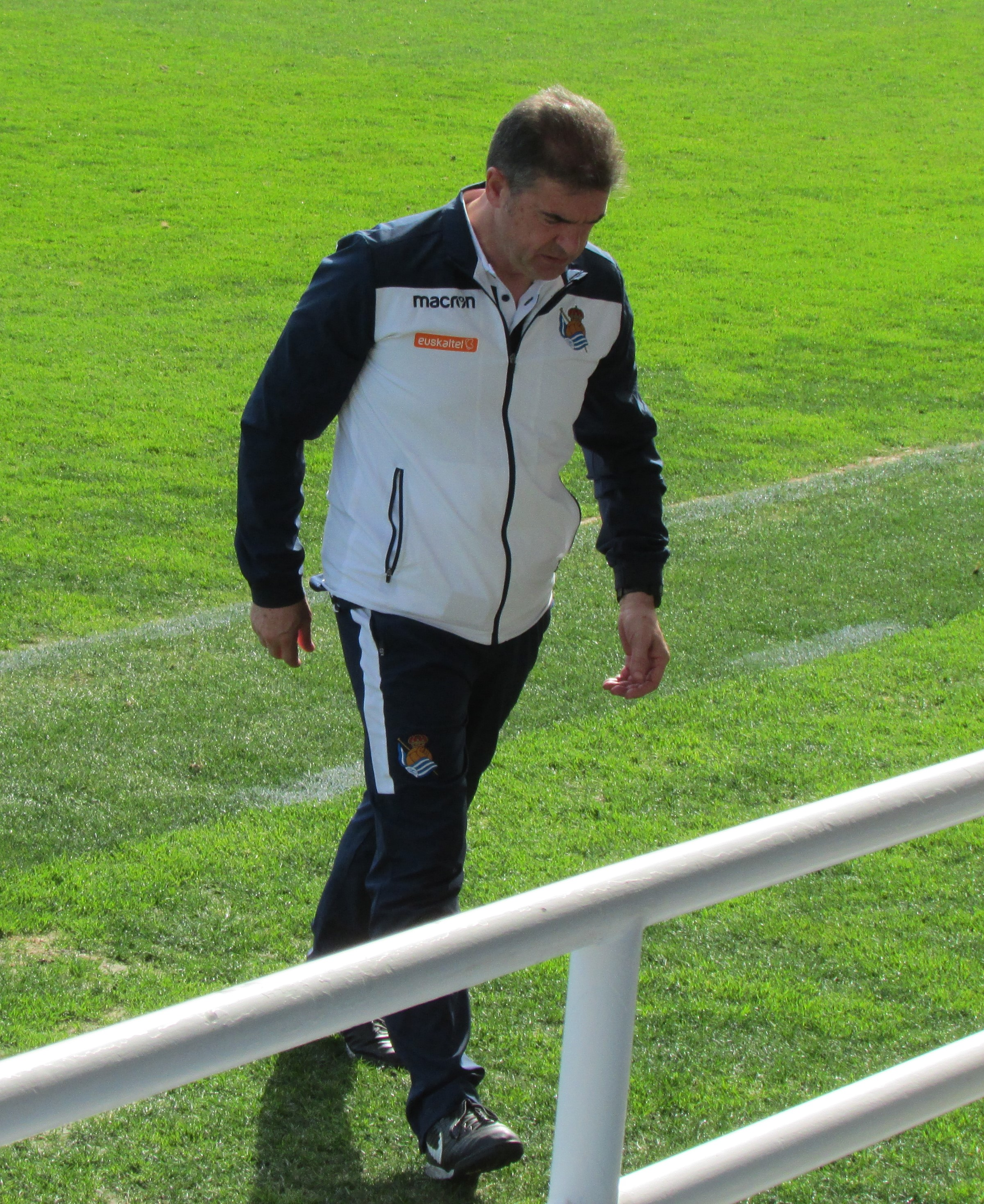 Entrenador real sociedad